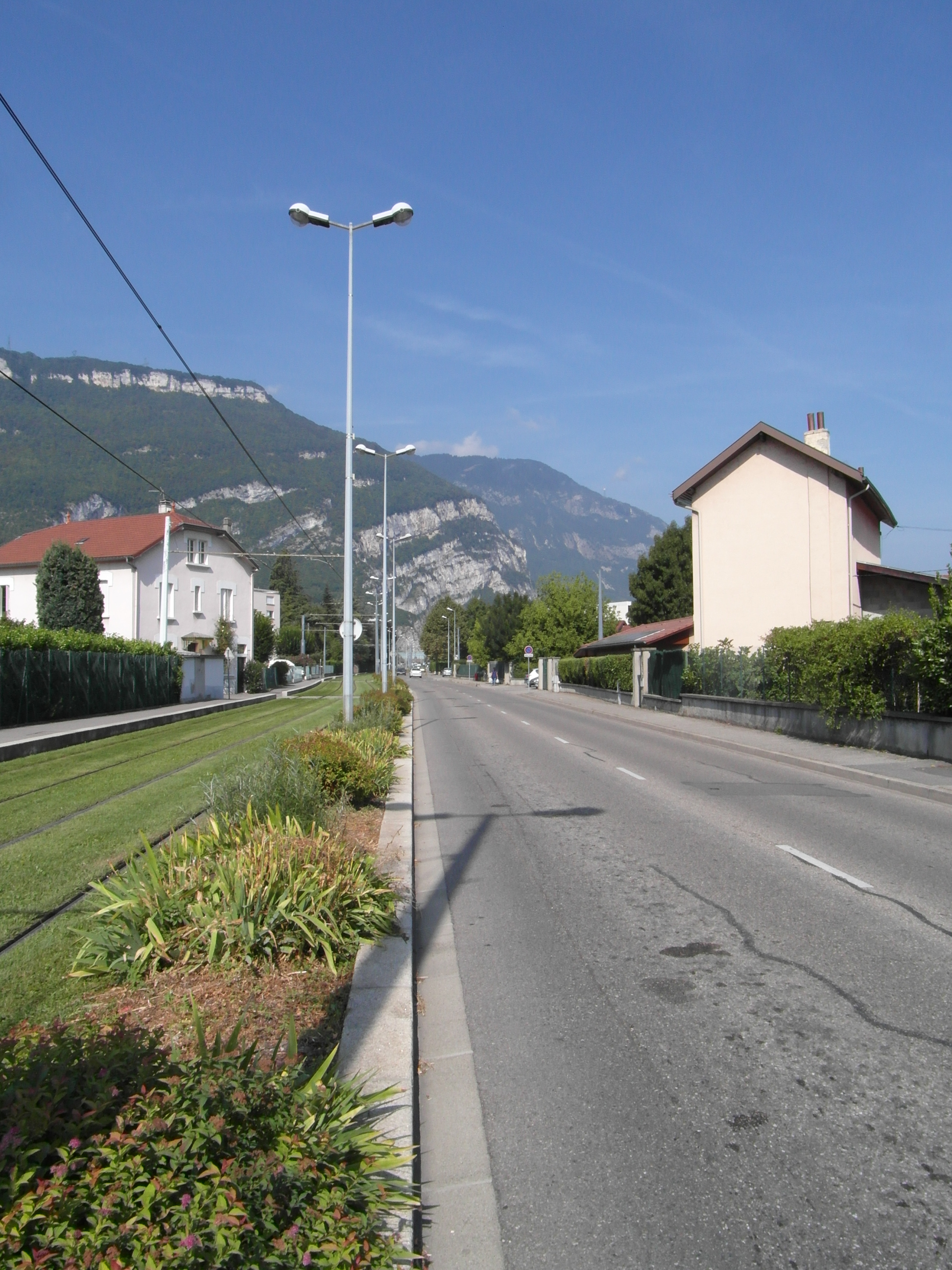 Avenue Aristide Briand Fontaine